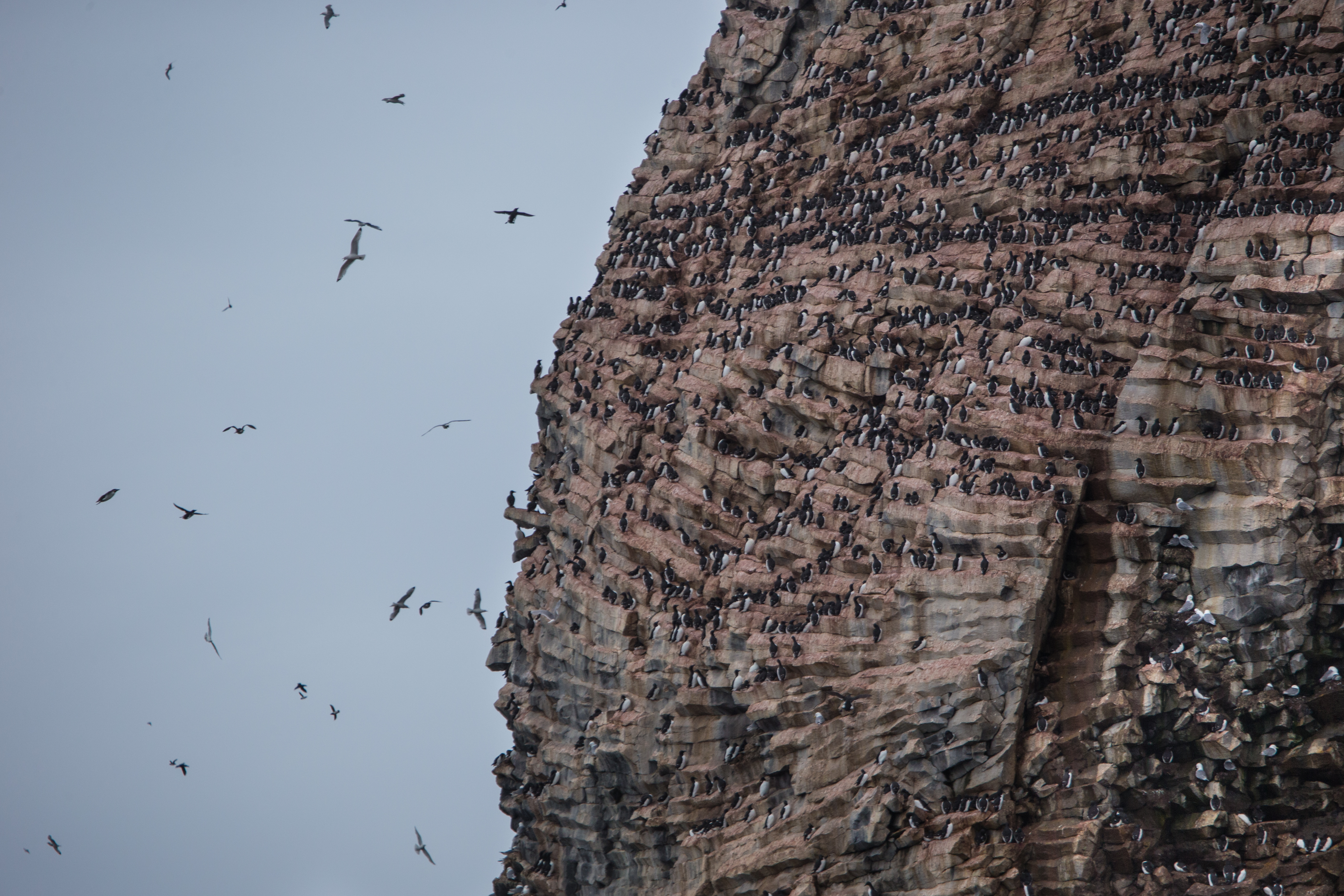 Комплексный заказник Земля Франца-Иосифа, Приморский район This image is related to the protected area of Russia number 2930163